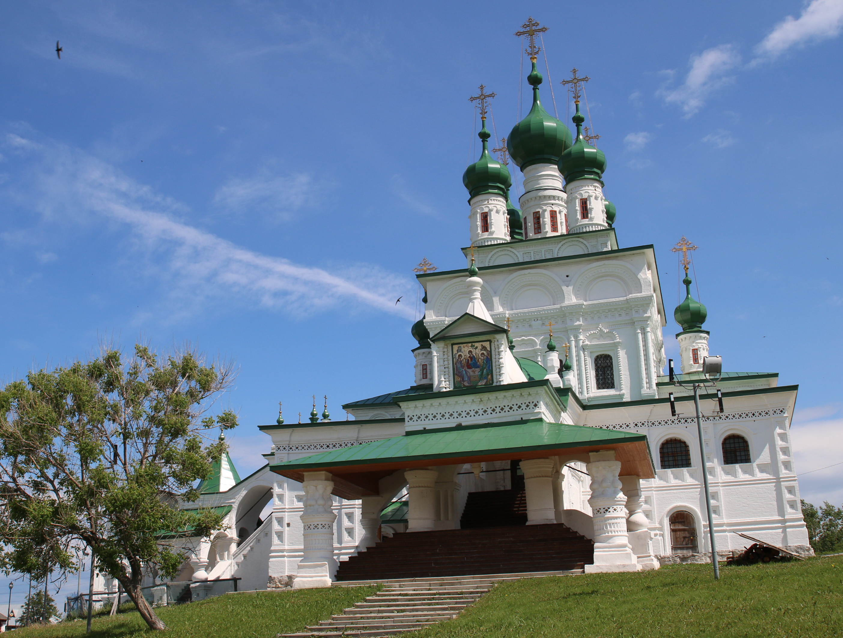 Троицкий собор (Соликамск)